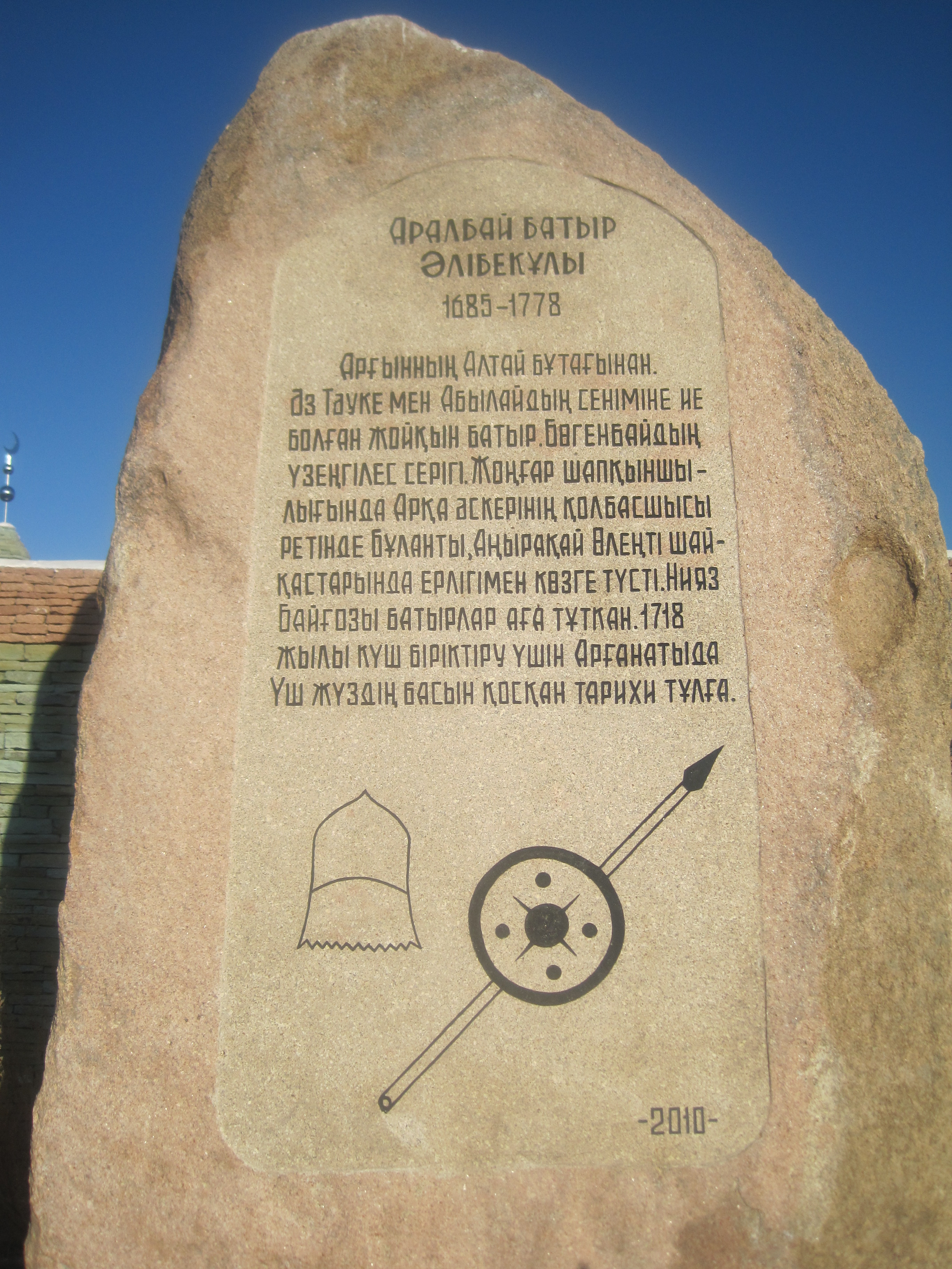 Ескерткіш тас